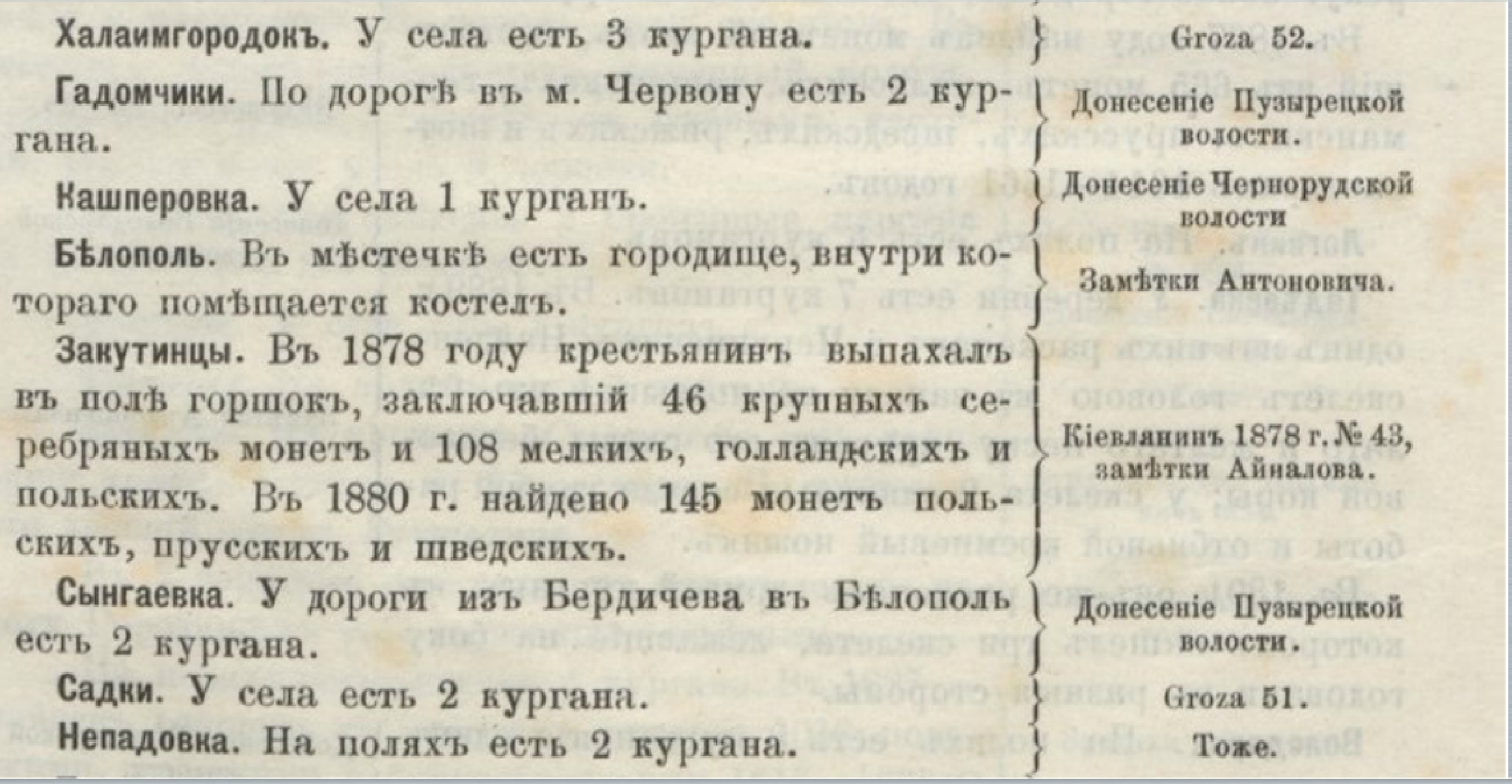 Уривок з Археологічної карти Київської губернії, складеної Антоновичем, де міститься інформація про село Закутинці